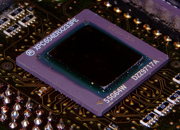 Motorola PowerPC 604e 233MHz